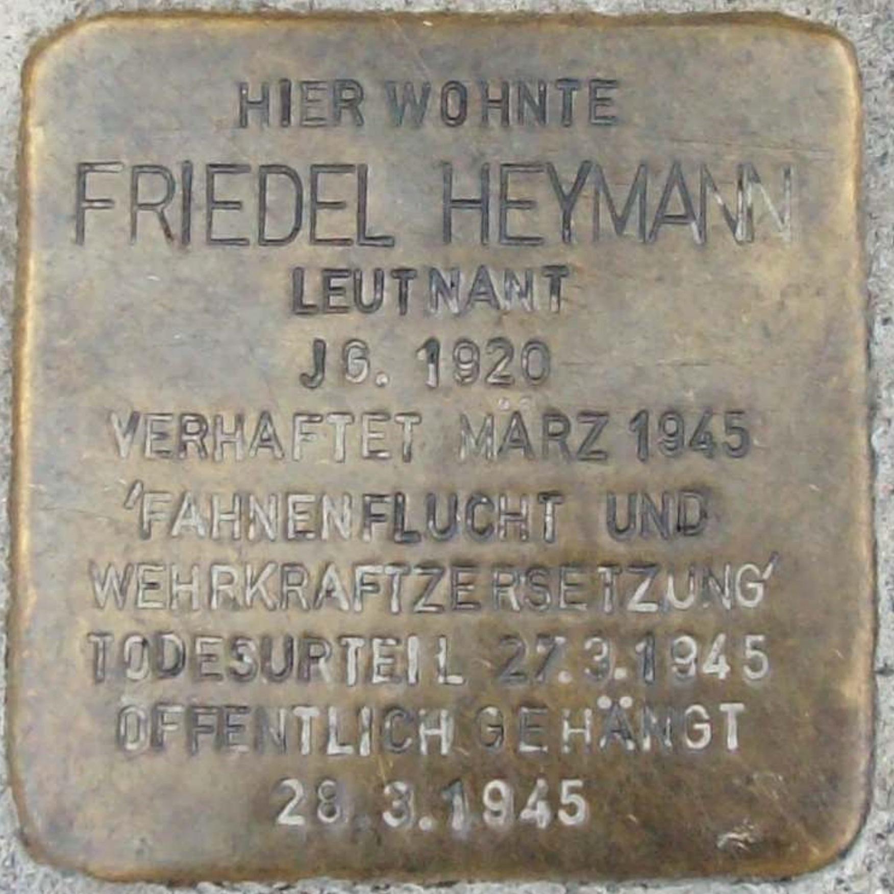 Stolpersteine Aschaffenburg-Schweinheim, Freundstraße 20 - Friedel Heymann